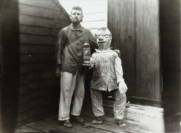 Foto. Portret van broeder Gabriël van de MSF naast een houtgesneden beeld dat is aangekleed met een pyjama en voorzien van een jeneverkruik, Borneo